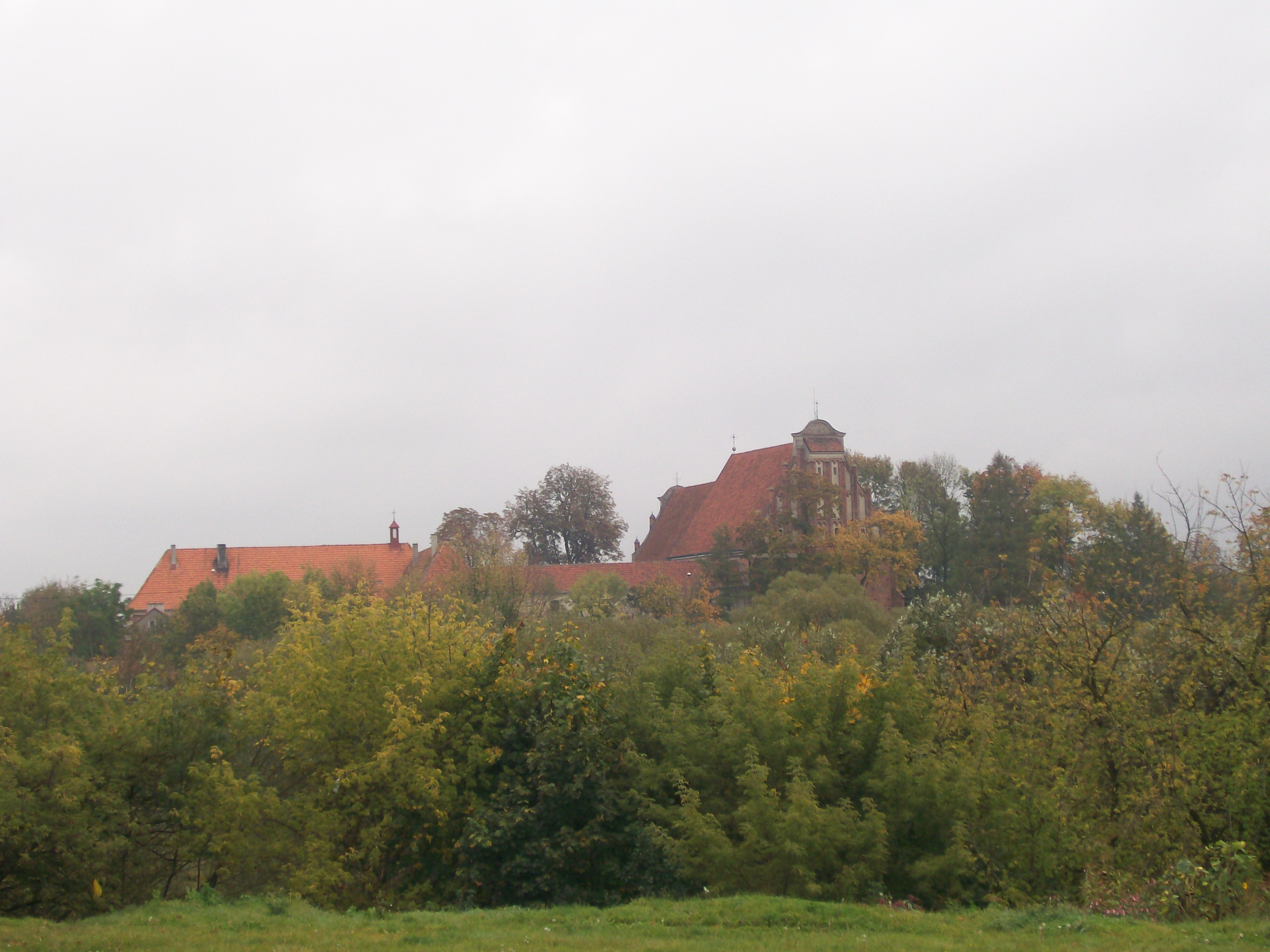 Zespół architektoniczny na wzgórzu Loret w Sierpcu. Kościół i Klasztor SS Benedyktynek (zabytek nr rejestr. 112)